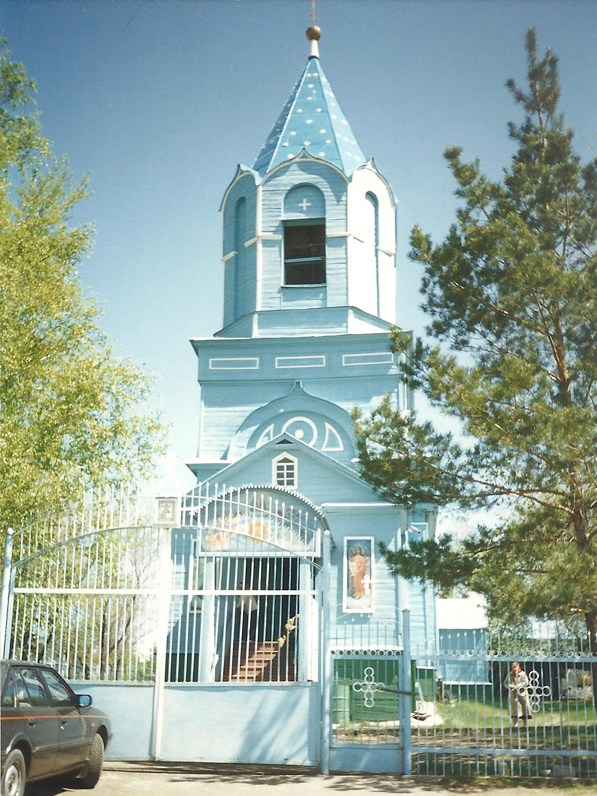 Ташла, 1990-е годы, Свято-Троицкий храм (из личного фотоархива)